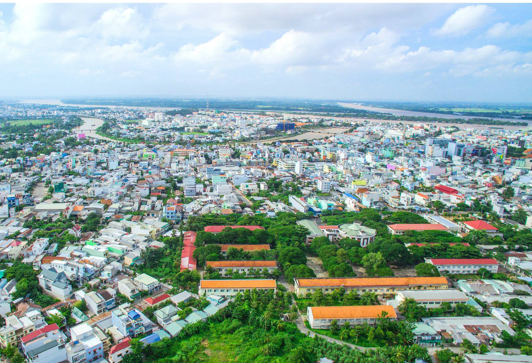 Long Xuyên nhìn từ phường Đông Xuyên